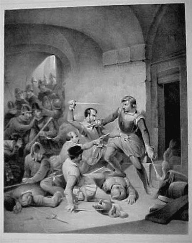 Herman de Ruiter blaast zichzelf en overige aanwezigen in de kamer op door het kruitvat aan te steken als Spaanse soldaten hem neigen te doden.